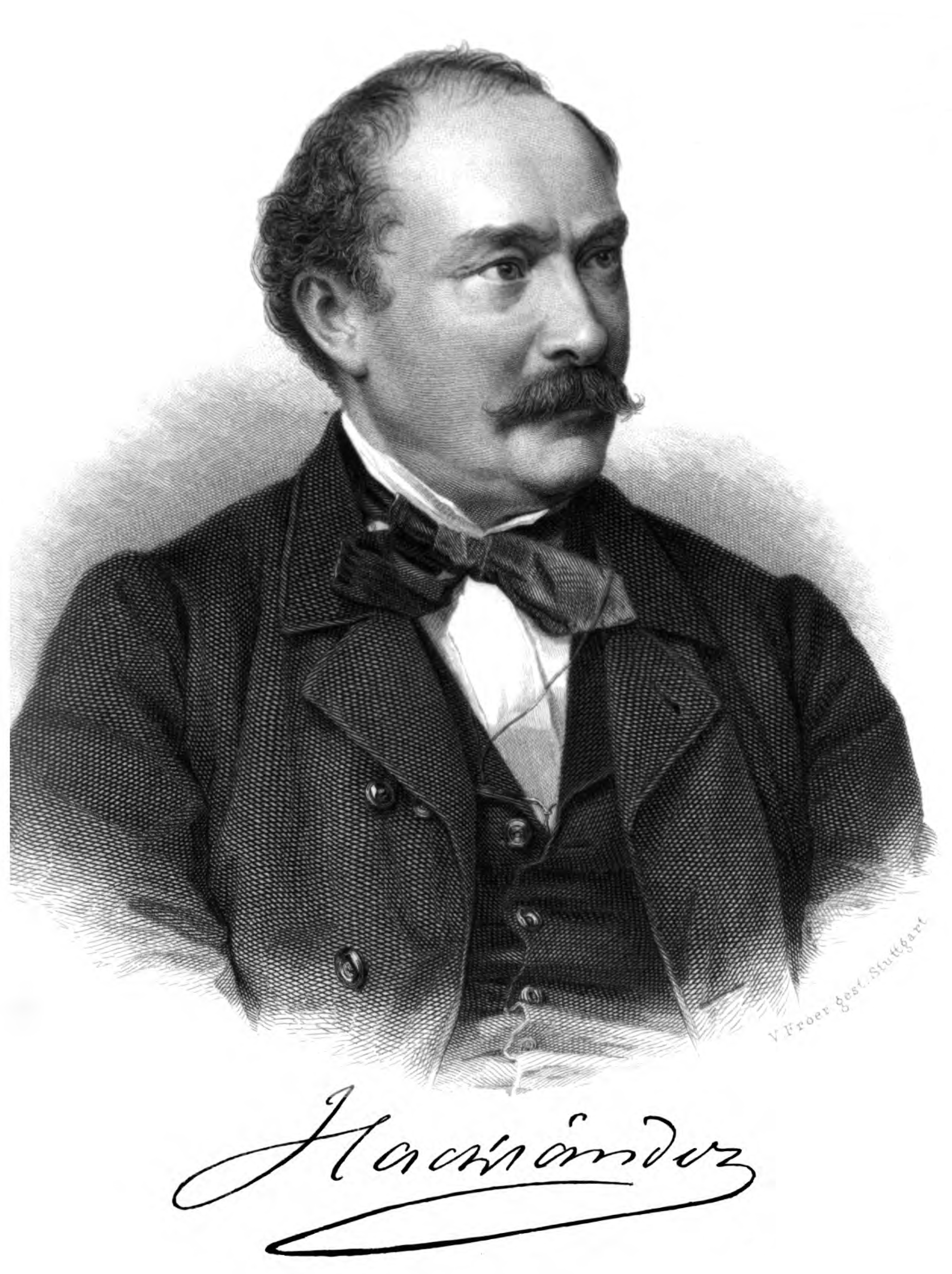 Porträt: Friedrich Wilhelm Hackländer. In: F. W. Hackländer’s Werke. Erste Gesammt-Ausgabe. Adolph Krabbe, Stuttgart, 1. Band, 2. Auflage, 1863